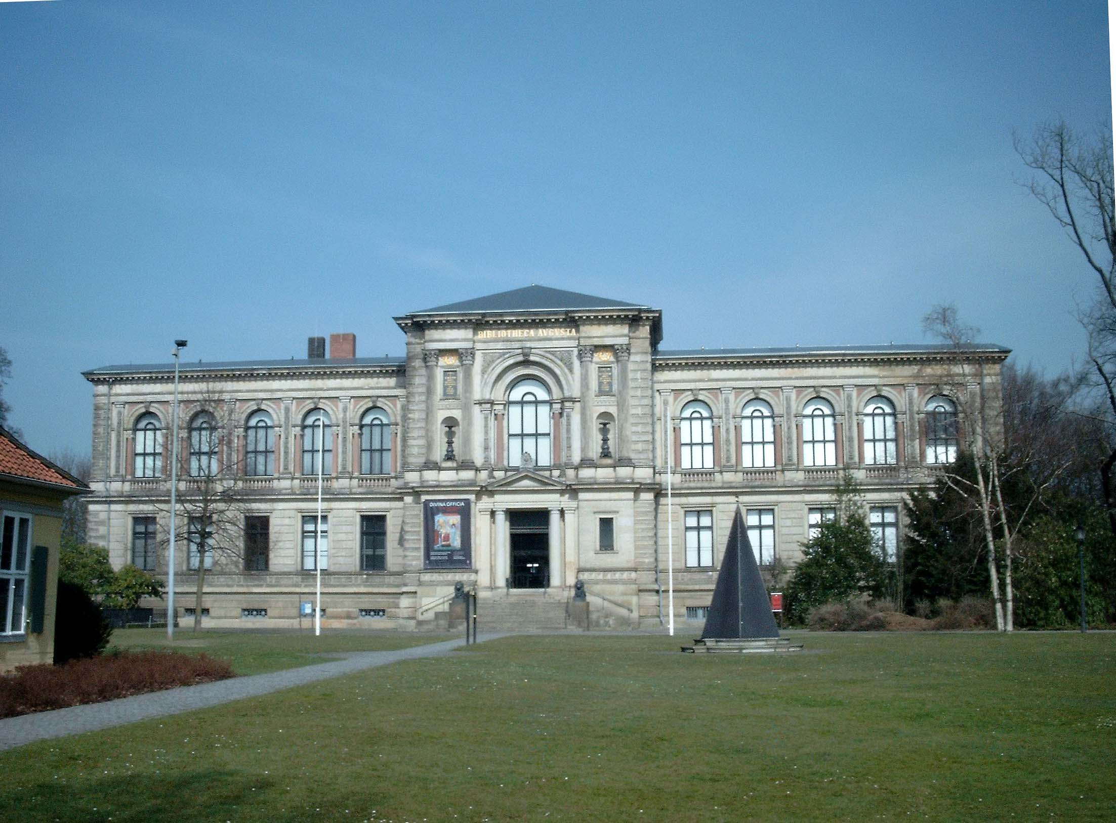 Herzog August Bibliothek Wolfenbüttel, südliche Frontfassade des Gebäudes, von Süden aus.